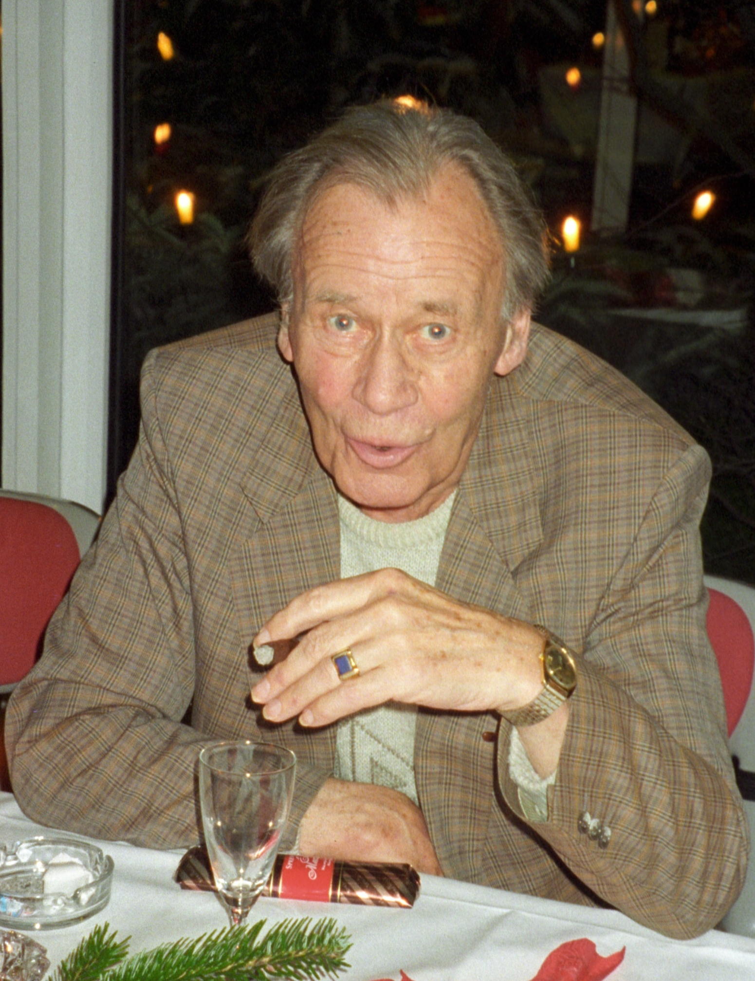 Tagesschausprecher Karl (Charlie) Fleischer